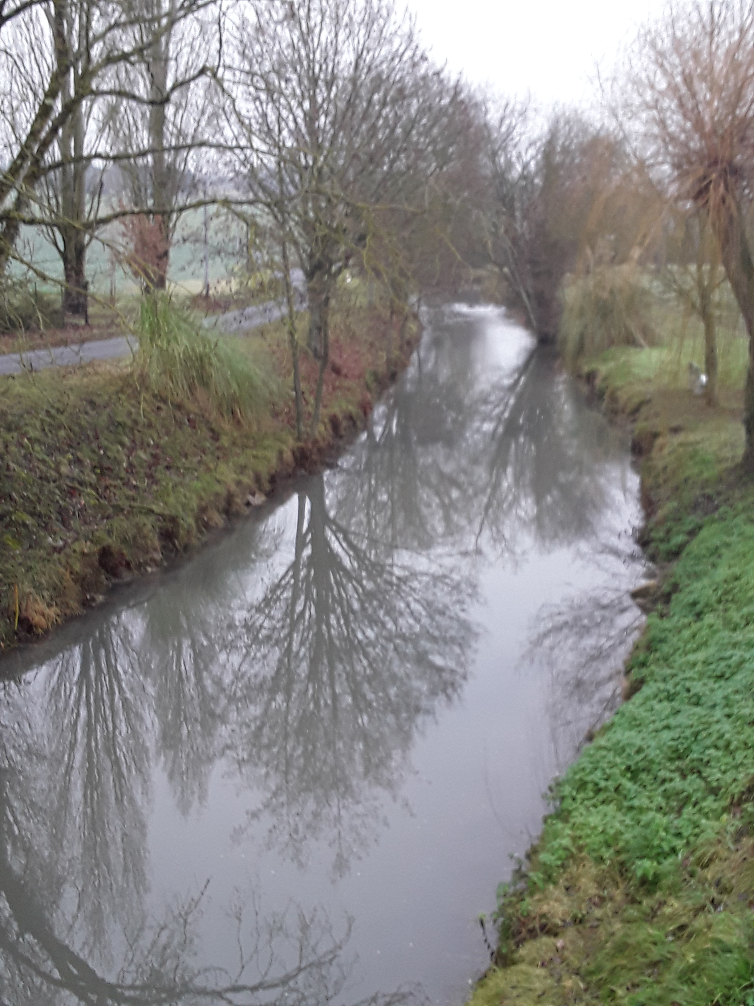 L'Esves (rivière) près du bourg de Marcé-sur-Esves (indre-et-Loire) en hiver.